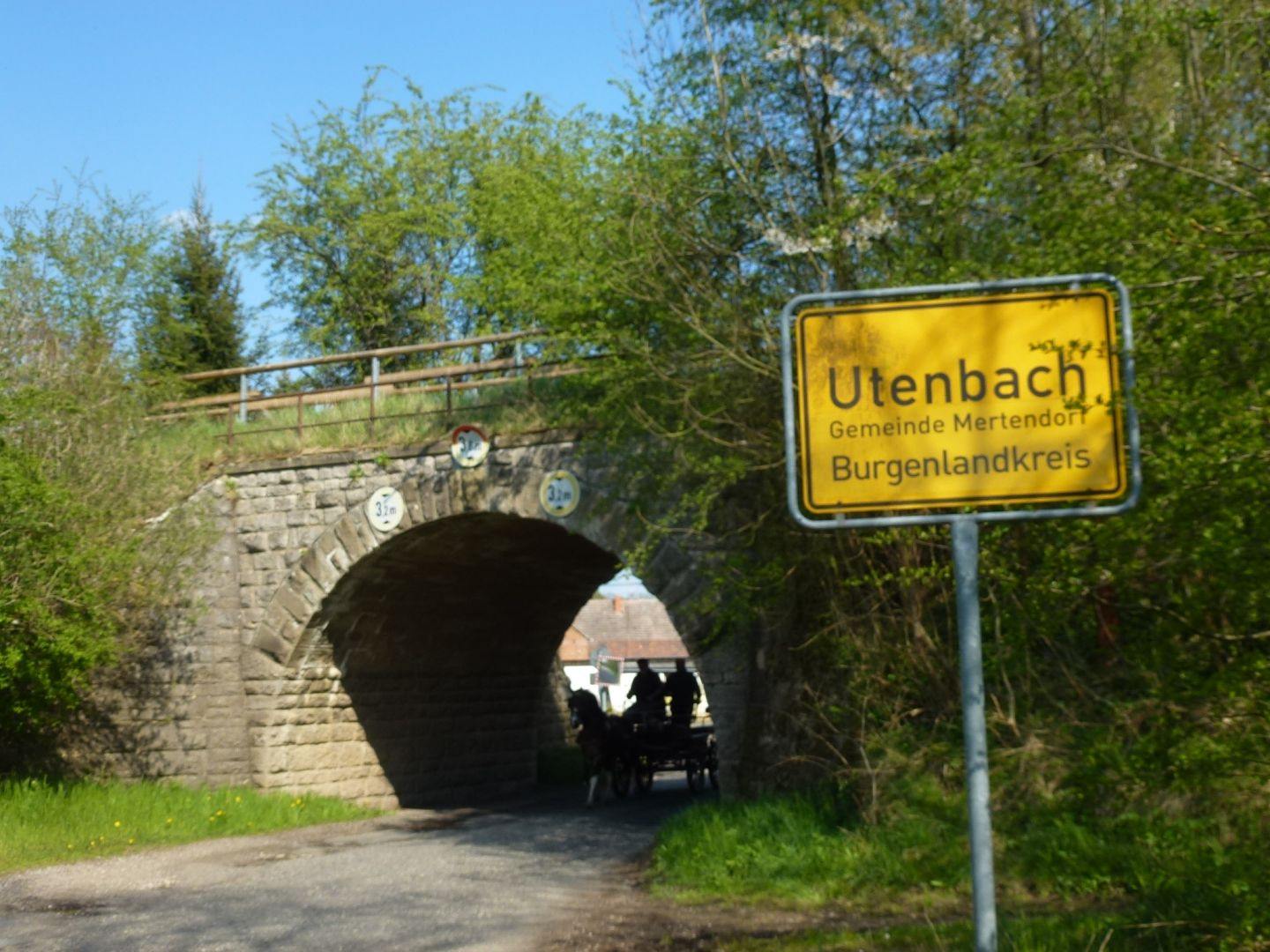 Brücke der ehem. Bahnlinie bei Utenbach